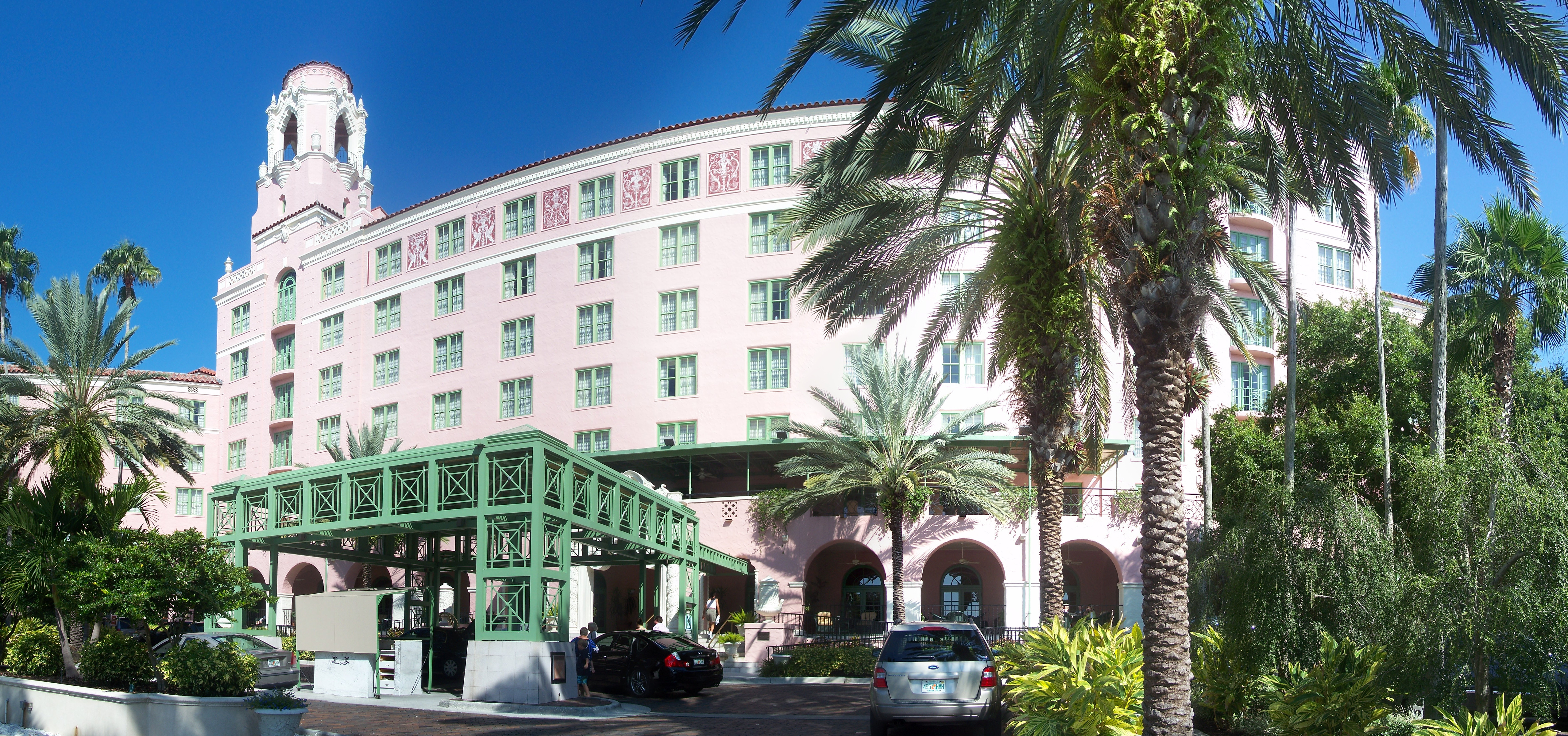 St. Petersburg, Florida: Vinoy Park Hotel